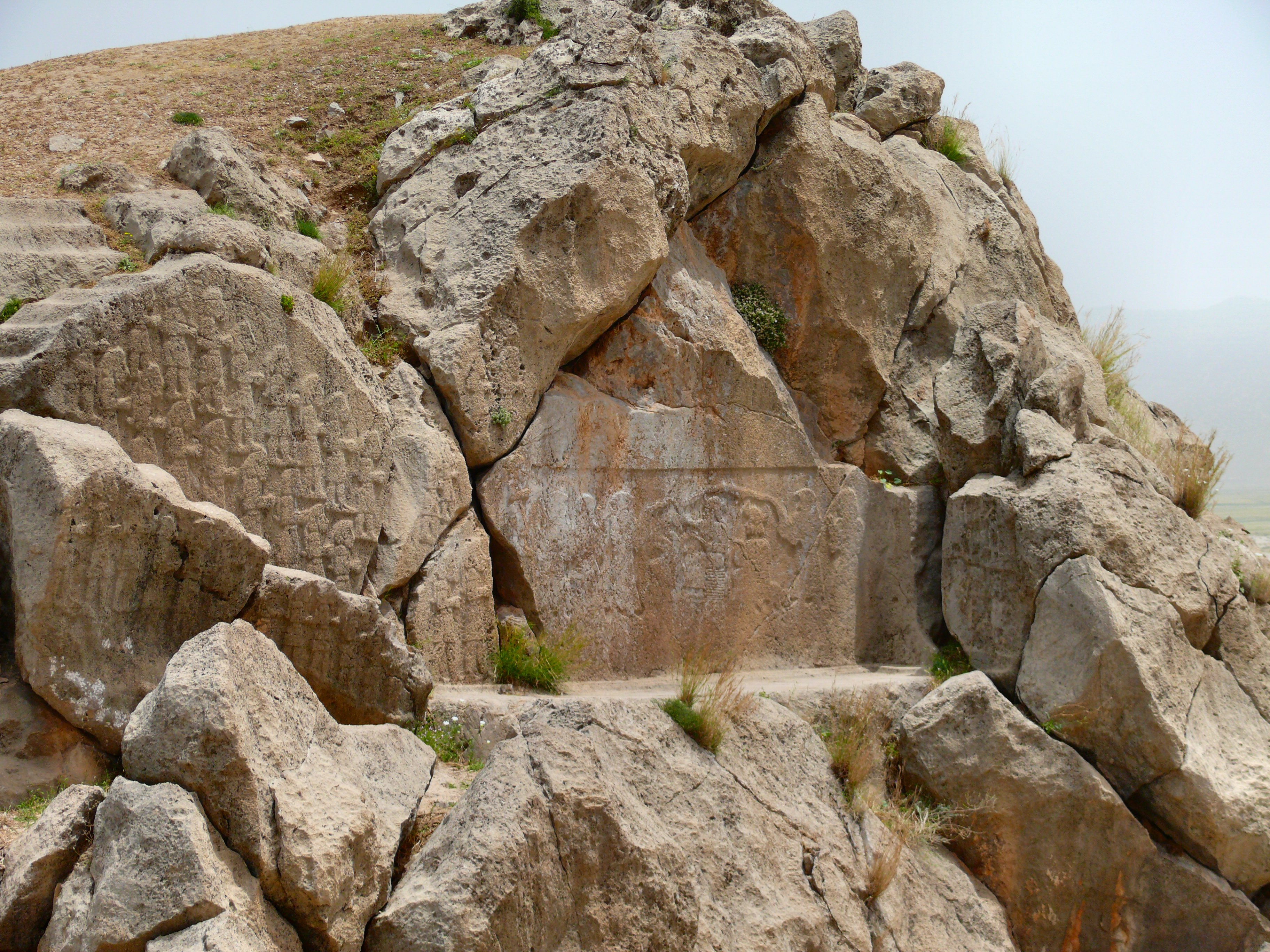 Kurangun panels